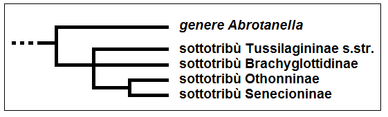 Abrotanella - Cladogramma